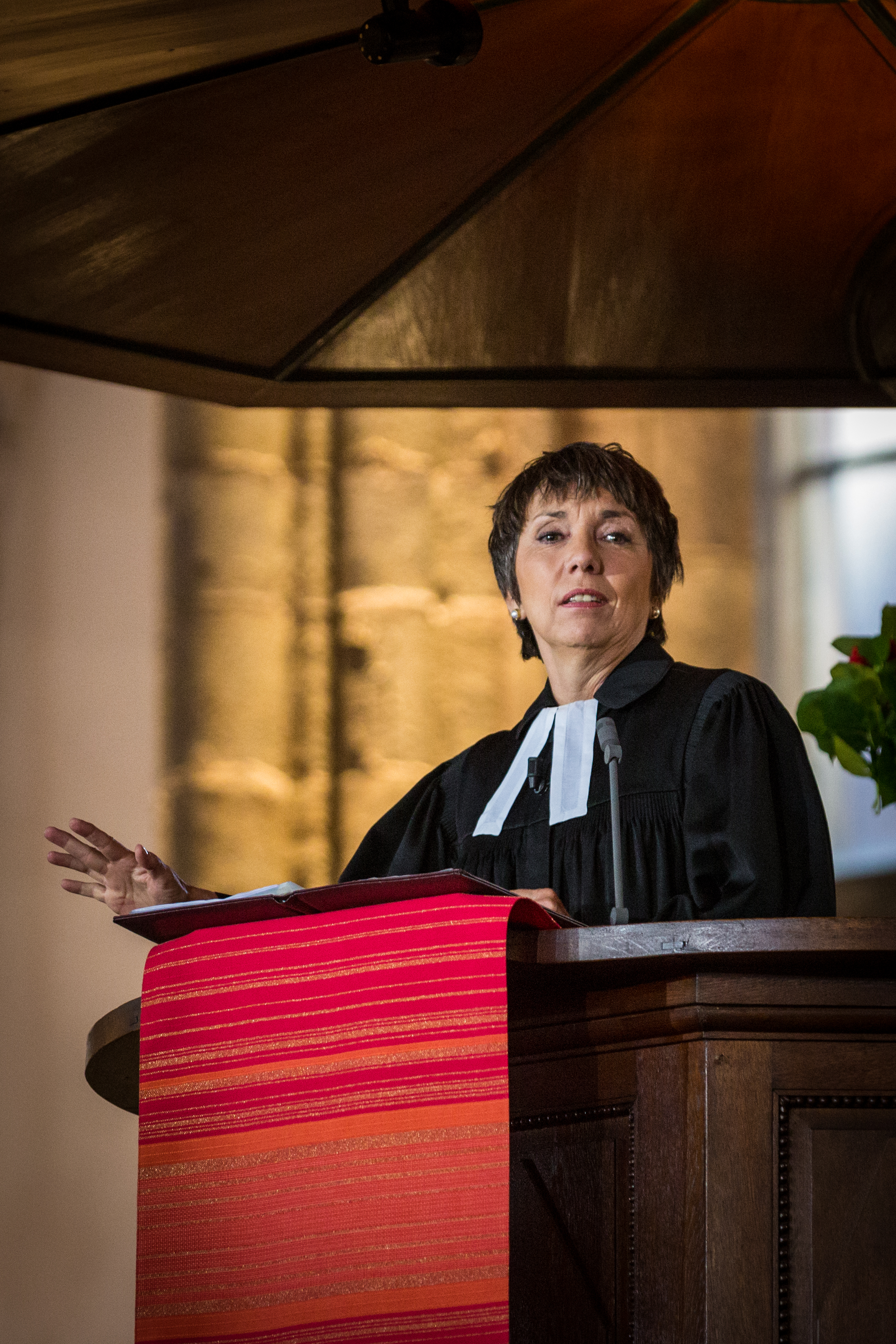 Margot Käßmann au cours d’une prédication à l’occasion de la Fête de la Réformation à l’église Saint-Thomas de Strasbourg le 31 octobre 2015.